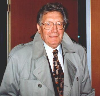 Dick Engelbracht sr